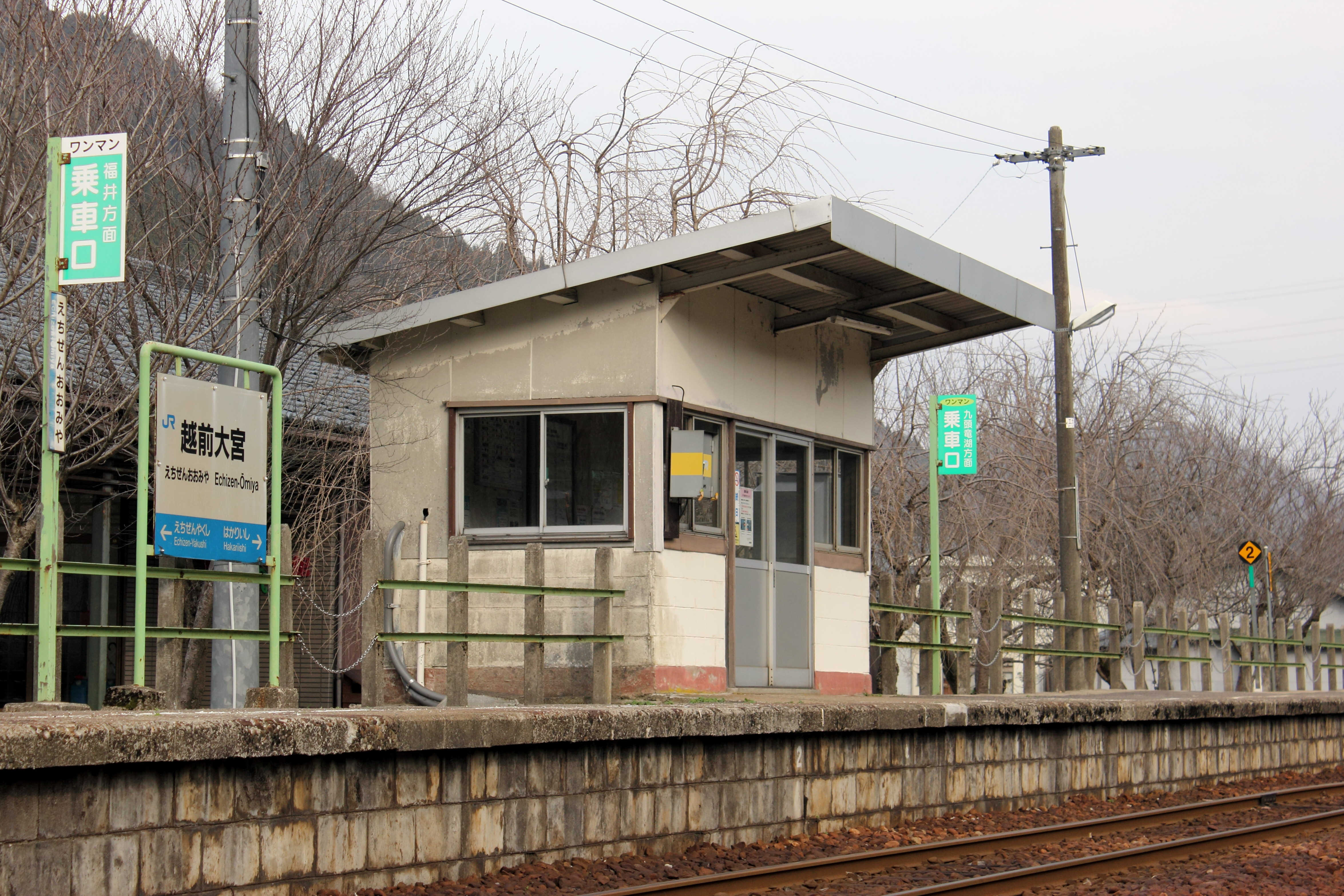 越前大宮駅 2013.3.24